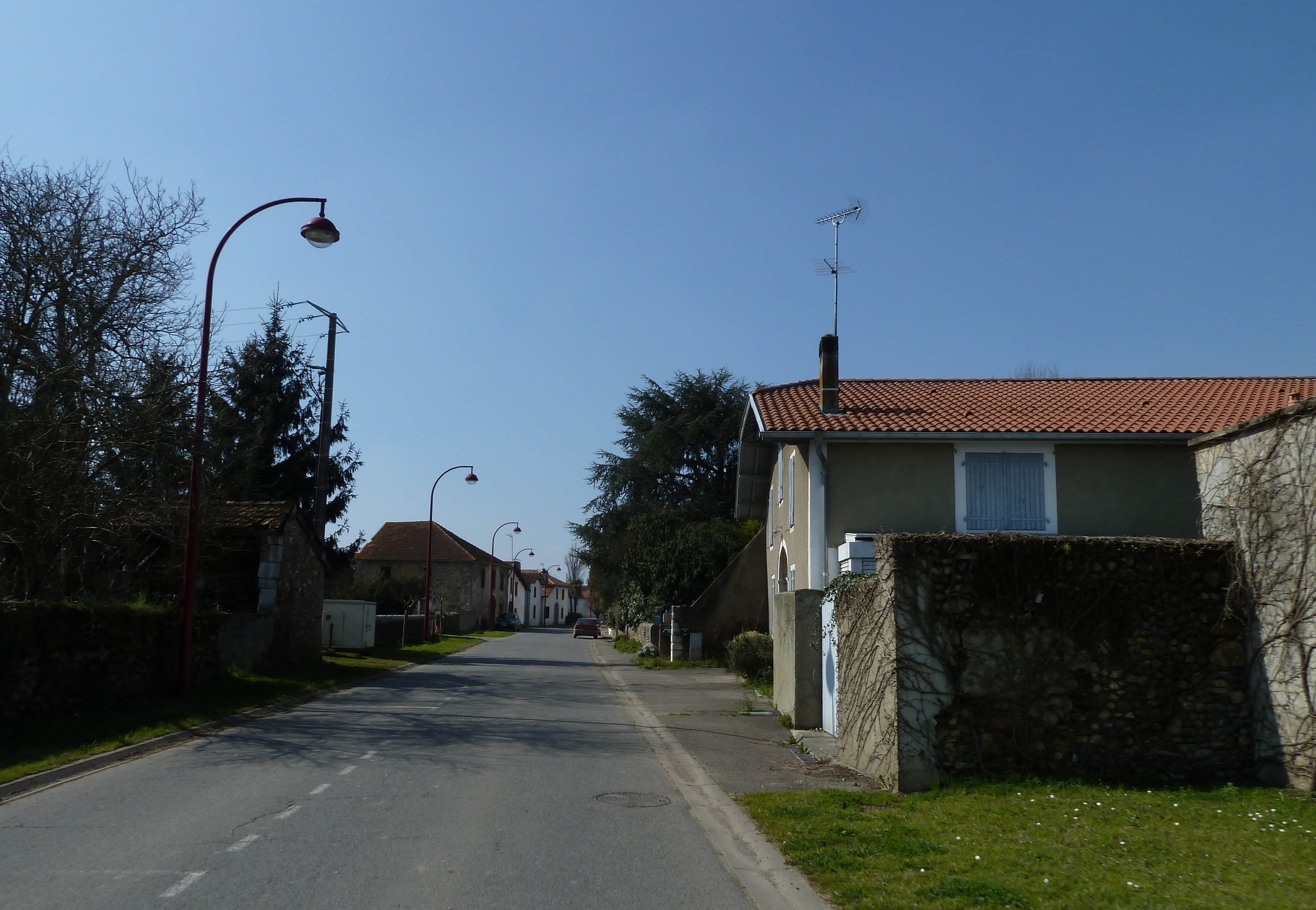 Lahontan